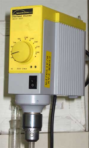 Silnik laboratoryjnego mieszadła mechanicznego